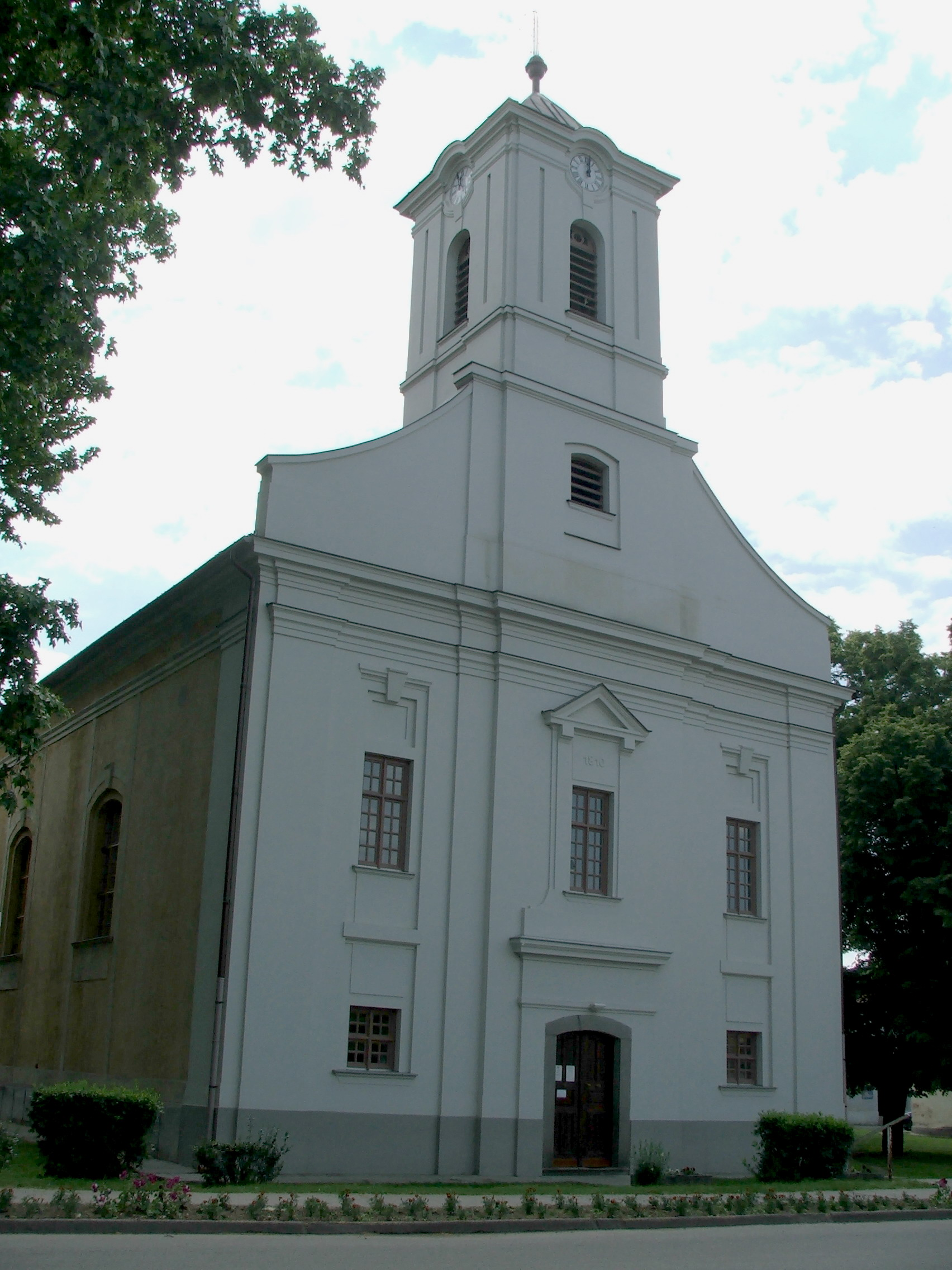 A pilismaróti Szent Lőrinc vértanú katolikus templom. Épült, korábbi templom felhasználásával, 1787-1792 között. 1810-ben átépítették. azonosító: 6358, törzsszám: 2516 - Komárom-Esztergom m. Pilismarót, Köztársaság tér This is a photo of a monument in Hungary. Identifier: 6358